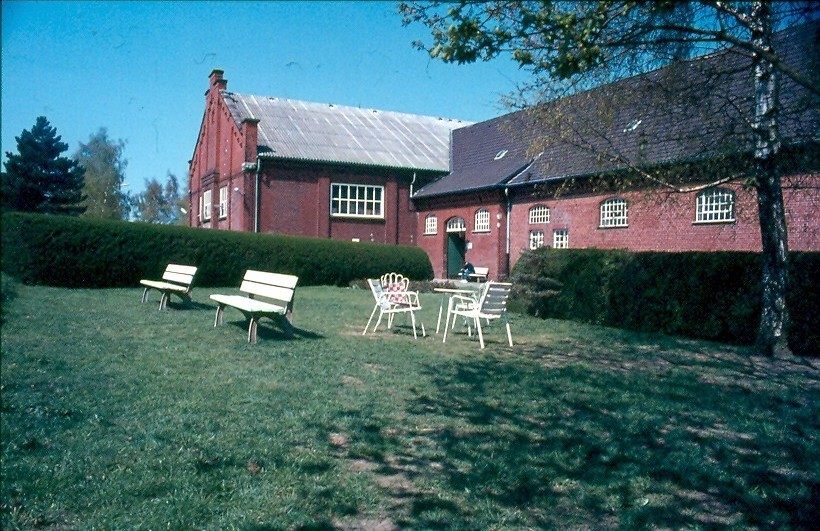 Kleine Reithalle und Stalltrakt (Stall 1 - Südstost) Westfälische Reit- und Fahrschule